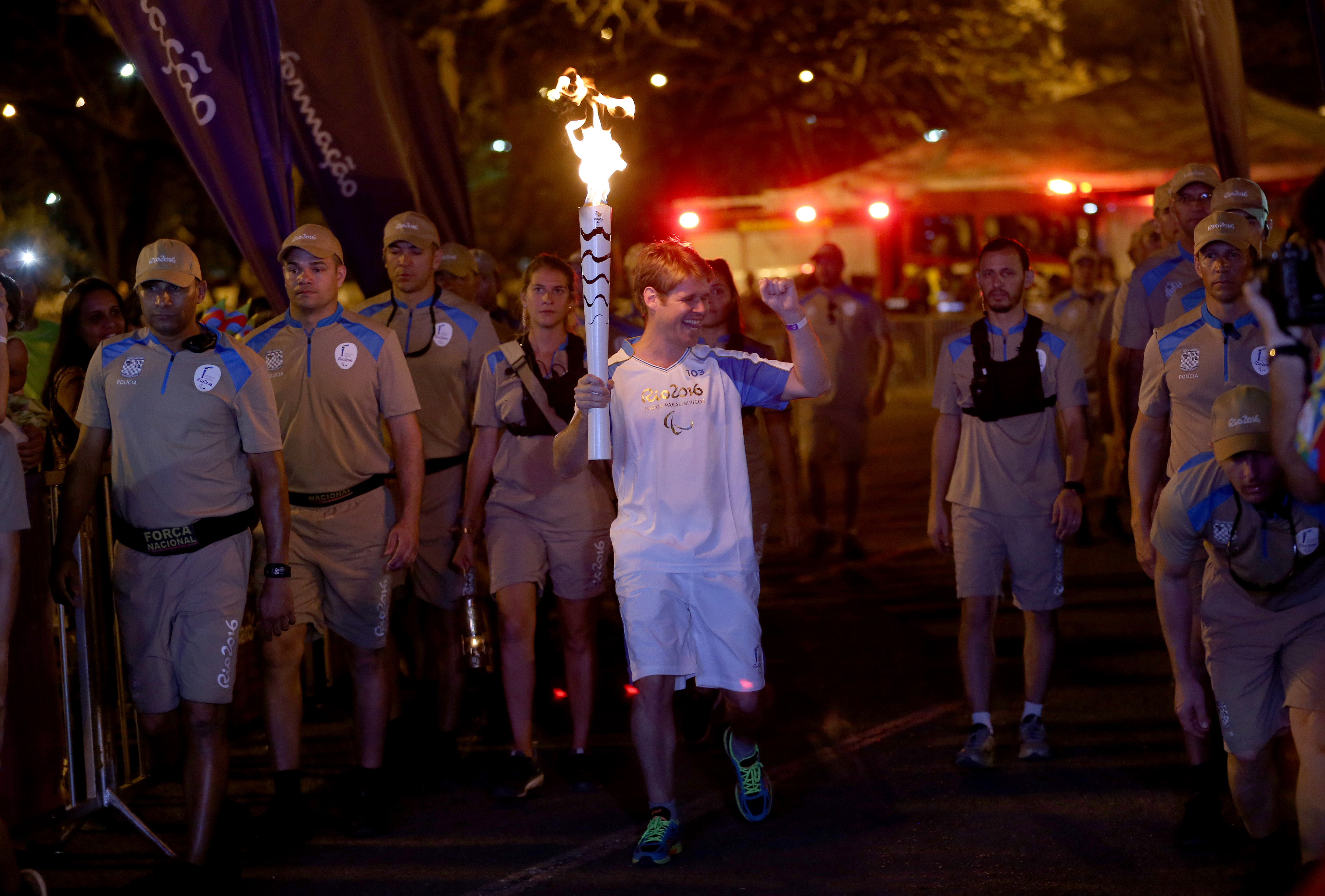 Brasília - Ex-triatleta Antonio Lanari Bo participa da cerimônia que marca o revezamento da tocha paralímpica no Distrito Federal, no Parque da Cidade (Wilson Dias/Agência Brasil)